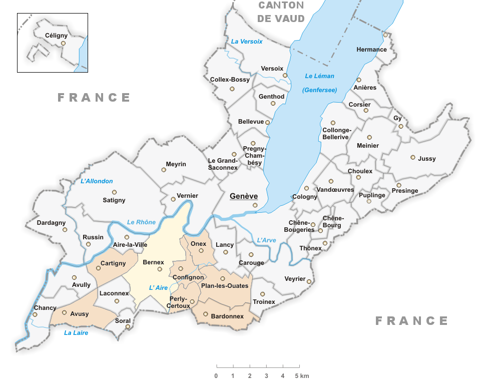 Communes concernées par Le Feuillu à Genève, en 2011.